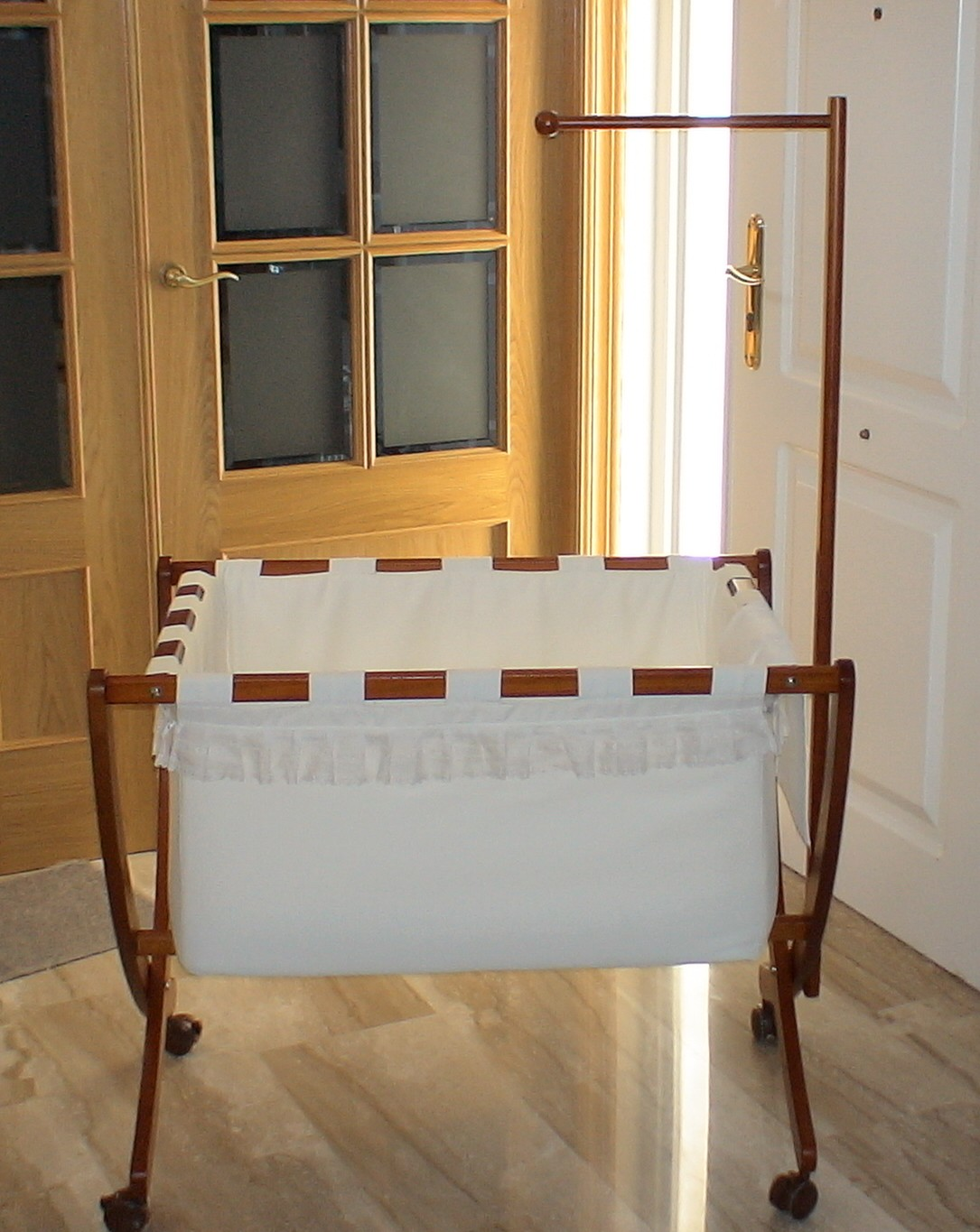 Movable, but not portable, home bassinet